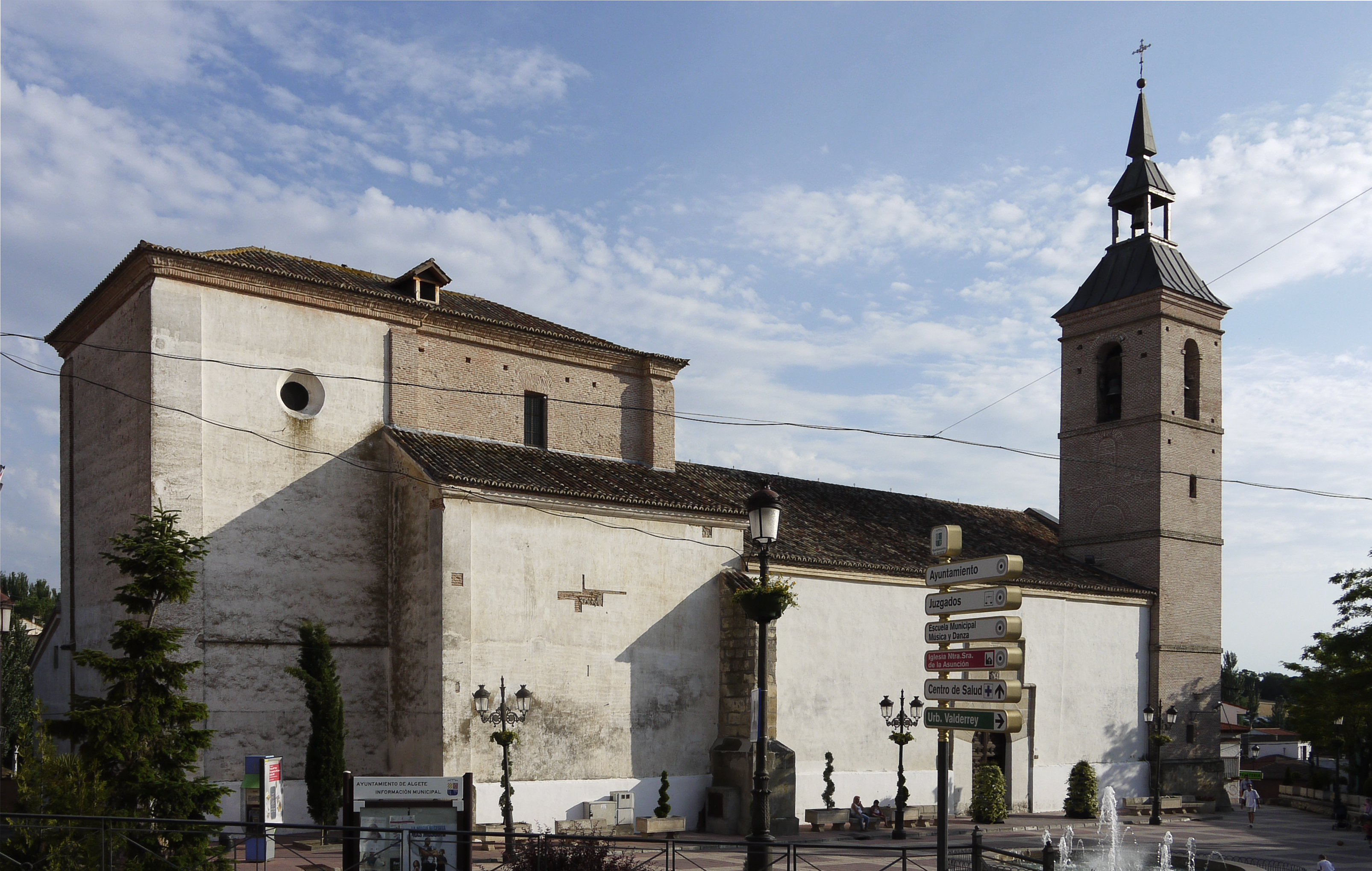 Iglesia Parroquial Nuestra Señora de la Asunción, Algete, Madrid, Spain.